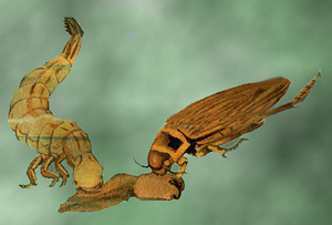 pływak żółtobrzeżek i jego larwa żerują na kijance